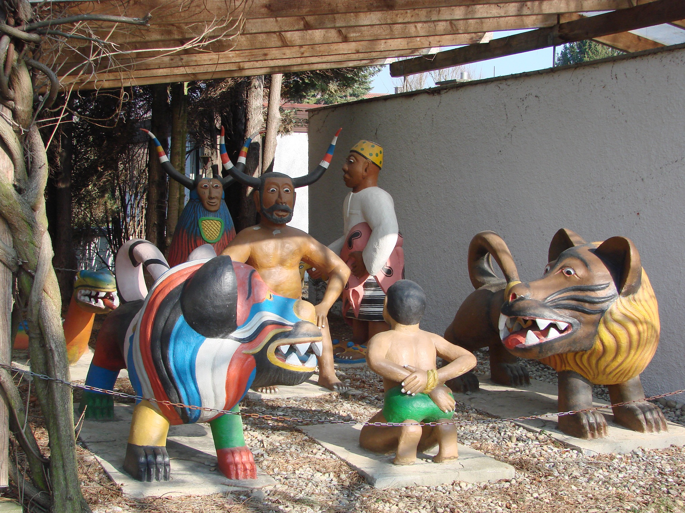 Freiberg am Neckar, Afrikahaus, Voodoo-Pantheon, Cyprien Tokoudagba, 1989